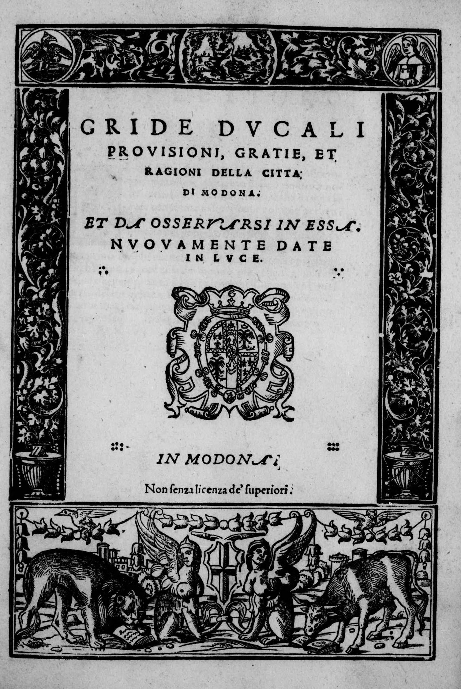 Frontespizio